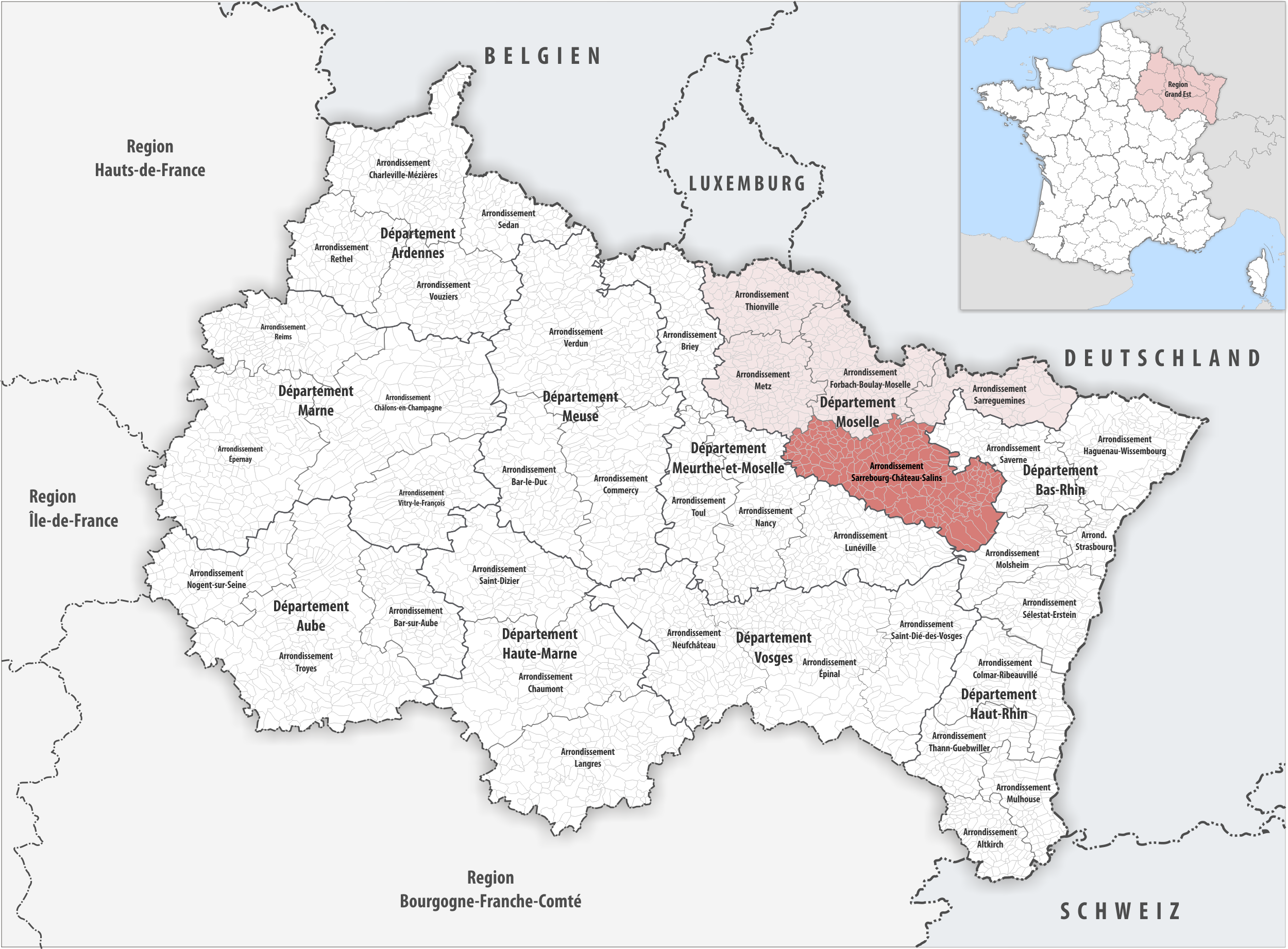 Lage des Arrondissements Sarrebourg-Château-Salins